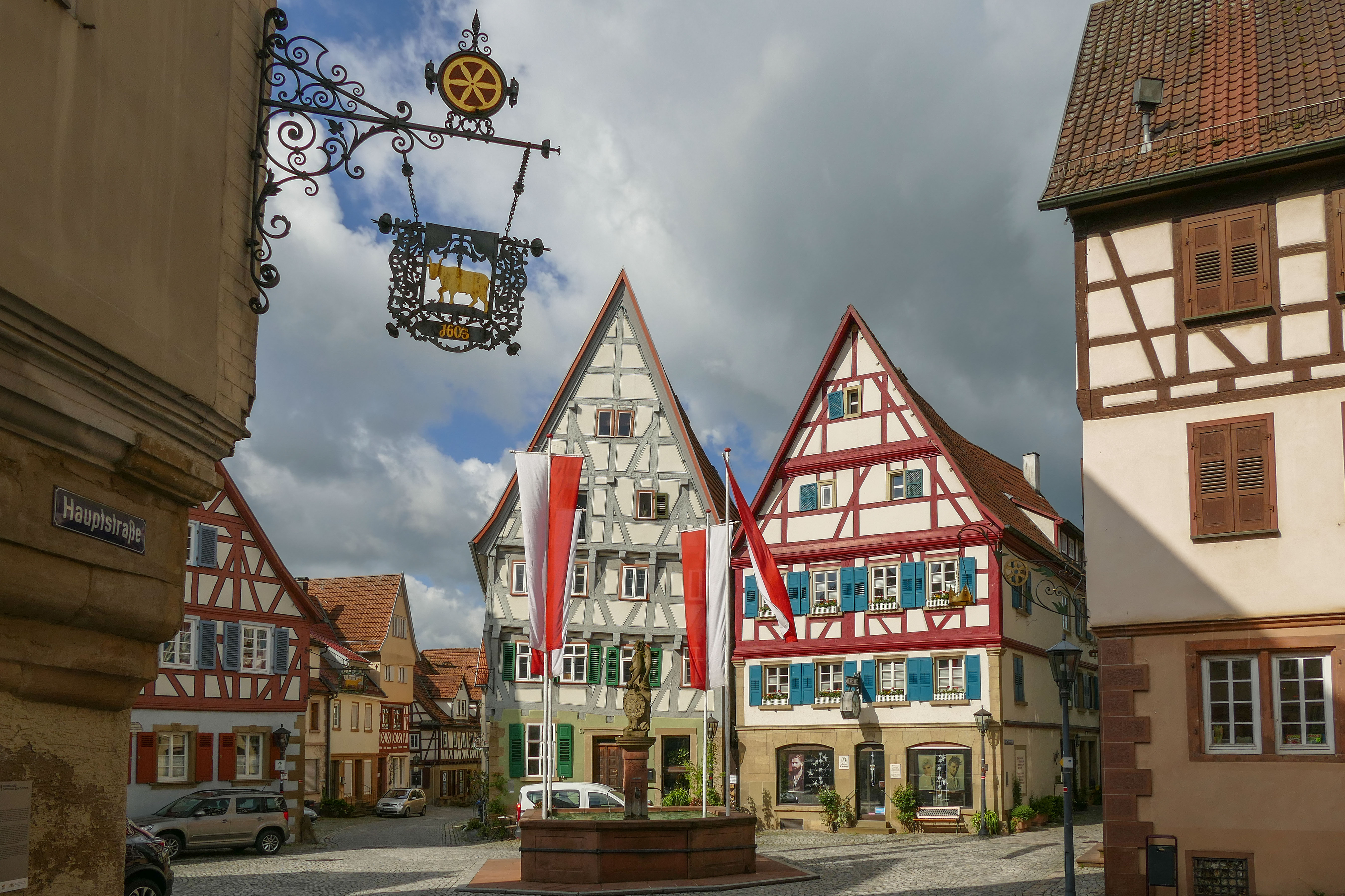 Der Marktplatz